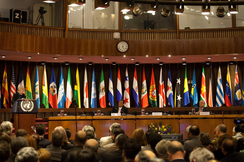 Santiago de Chile, 14 Mayo 2014.- El Presidente de la República, Rafael Correa Delgado, presentó en la Cepal su conferencia magistral "Retos de la Revolución Ciudadana: Neodependencia, neocolonialismo, y cambio estructural". Foto:Nina Zambrano Díaz. Cancillería del Ecuador.